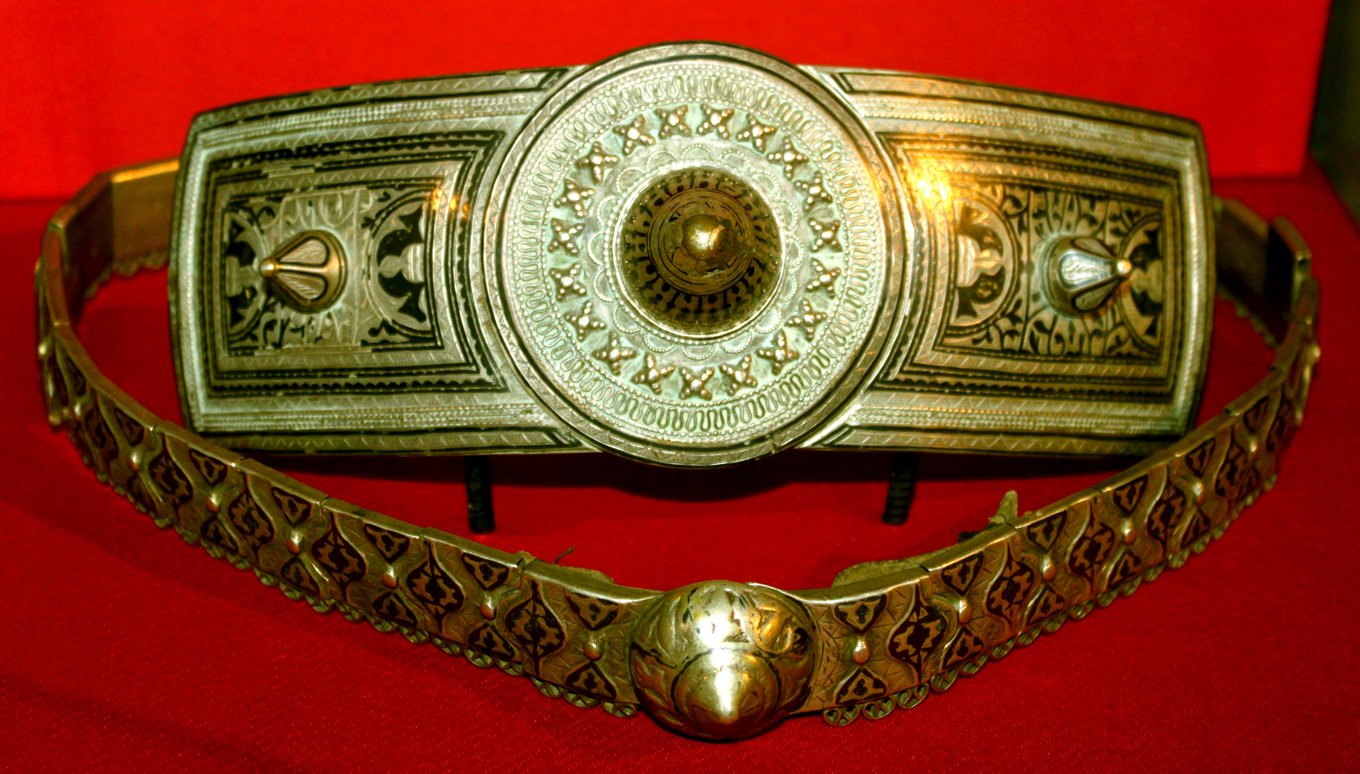 Şirvanşahlar sarayında Dağıstanın Kubaçi kəndindən aşkarlanmış gümüş kişi kəməri